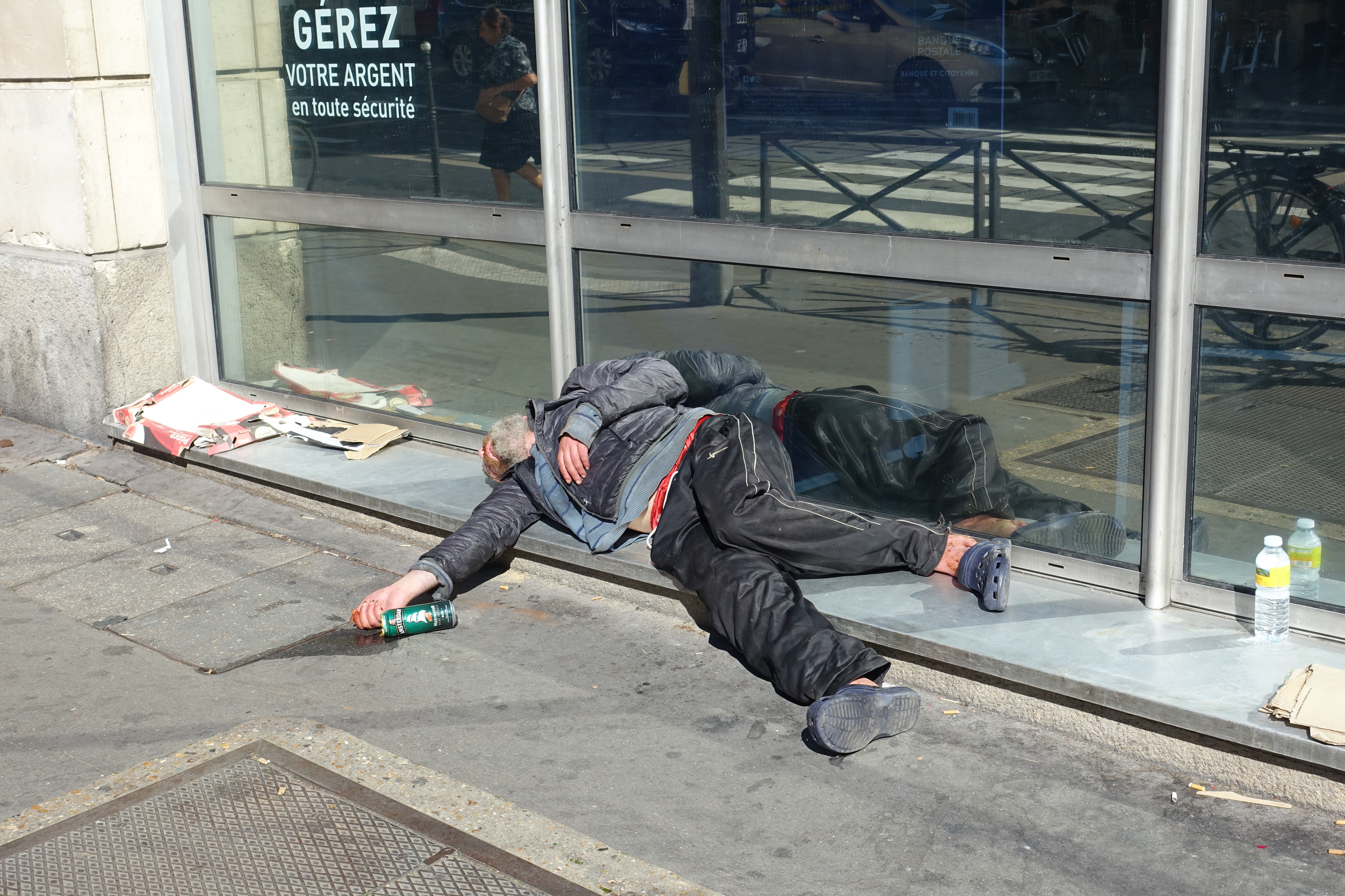 Amsterdam Maximator @ Paris